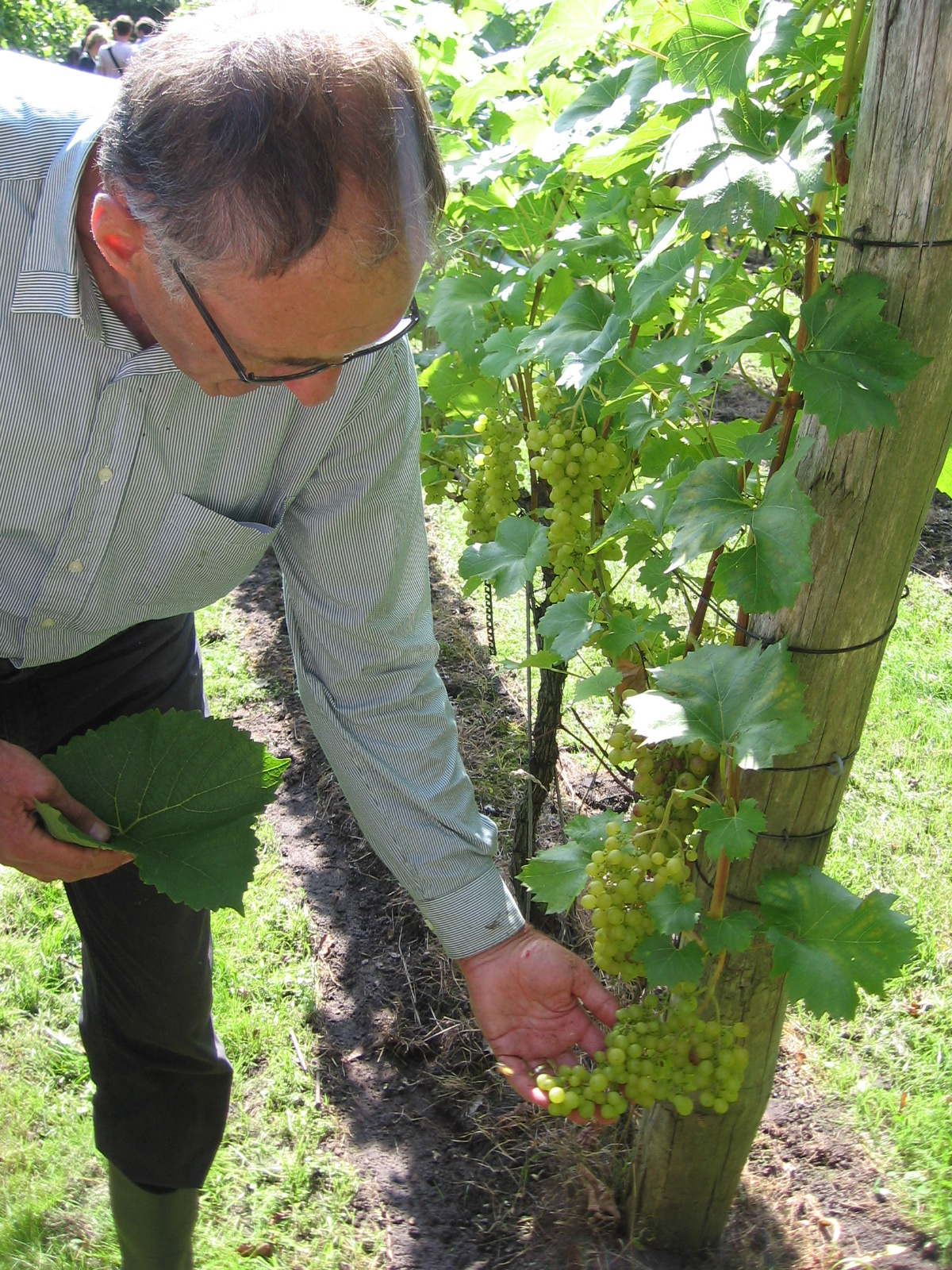 Cépage du domaine de Breede Beek